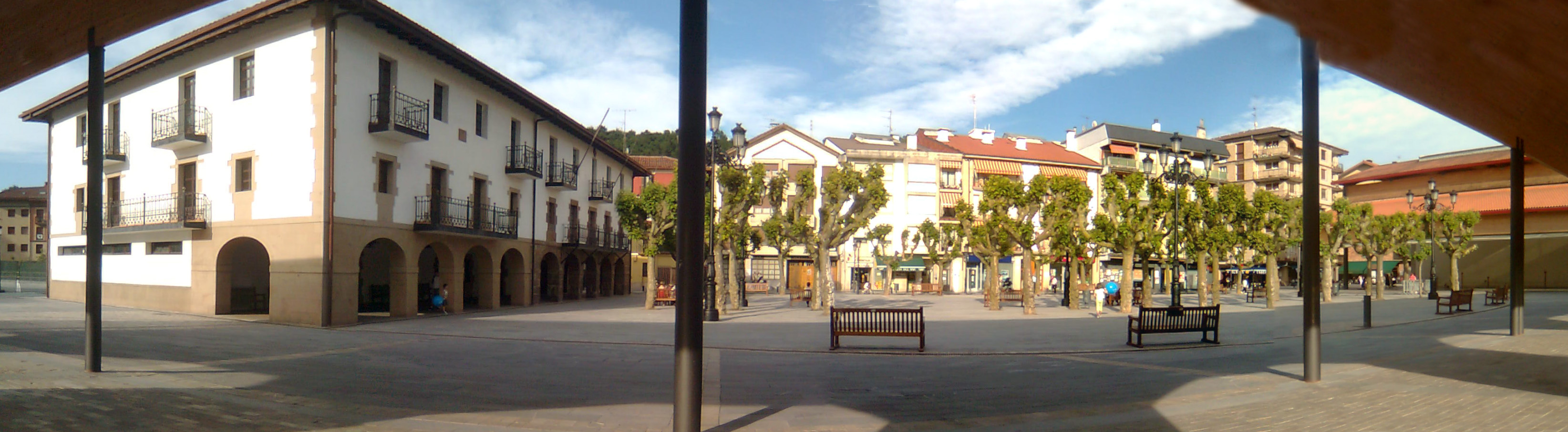 Lazkaoko plazaren irudia (Gipuzkoan)